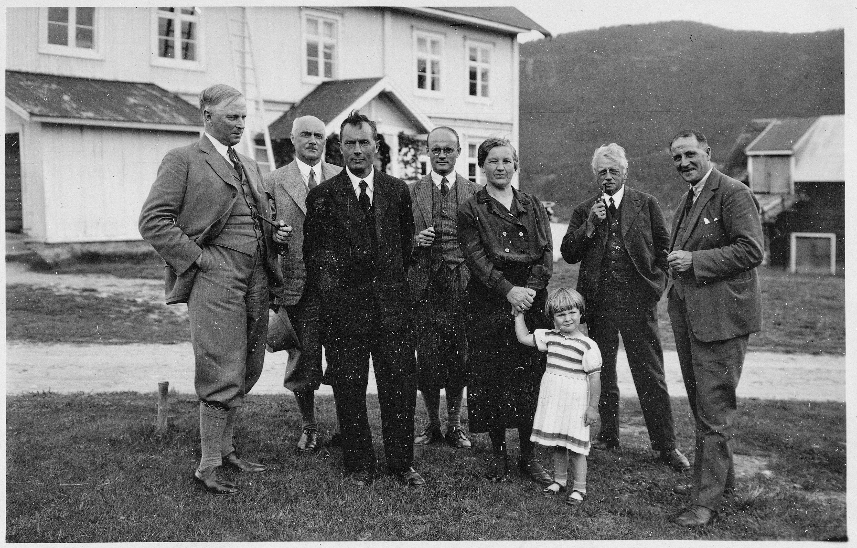 Bildet er hentet fra Arkivverket. Medlemmer av Høyfjellskommisjonen og lokalbefolkning fotografert i forbindelse med kommisjonens arbeid. Her hjemme hos kommisjonsmedlem Thorleif Bjøntegaard, som står til venstre i bildet. Arkivinstitusjon : Riksarkivet Arkivnavn : Høyfjellskommisjonen Sted : Norge, Hedmark, Rendalen, Hanestad Emneord: Allmenningsgrunn, Fjell, Fjellandskap, Høyfjell, Høyfjellsgrunn, Særdomstol Avbildet